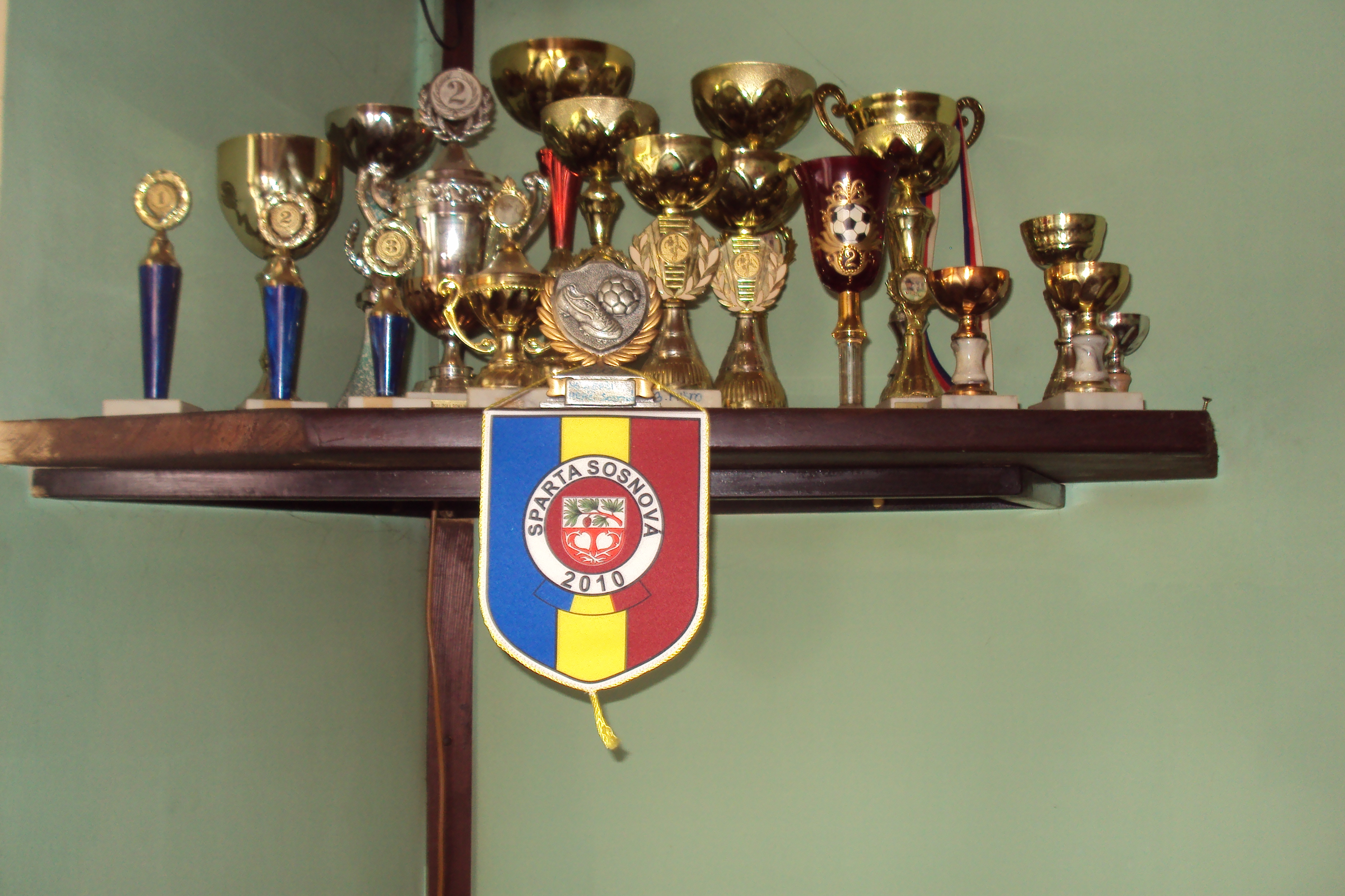 Vítězné poháry klubu FK Sosnová, vystaveny v restauraci Na růžku v obci Sosnová